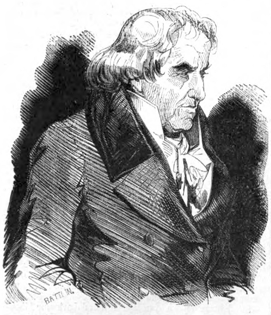 Ranieri Gerbi